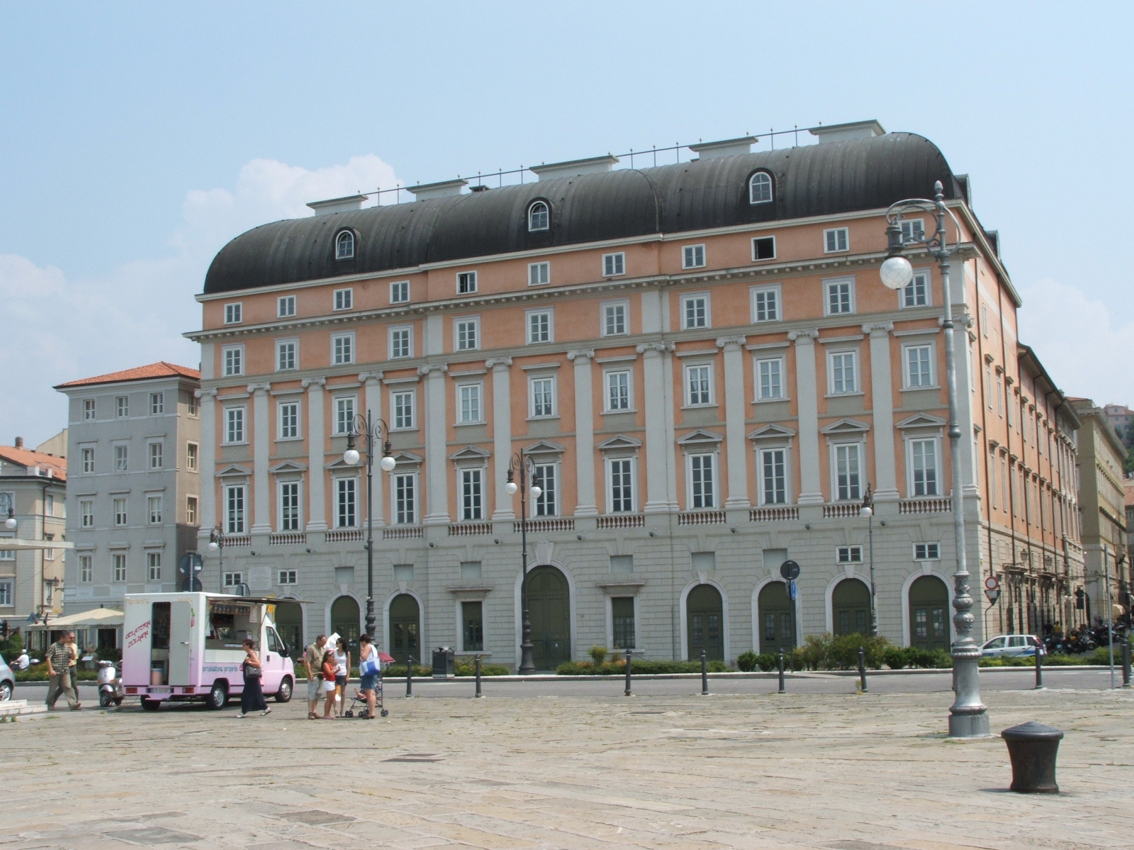 Palazzo Teatro Giuseppe Verdi da Trieste, Friuli-Venezia Giulia, Italia